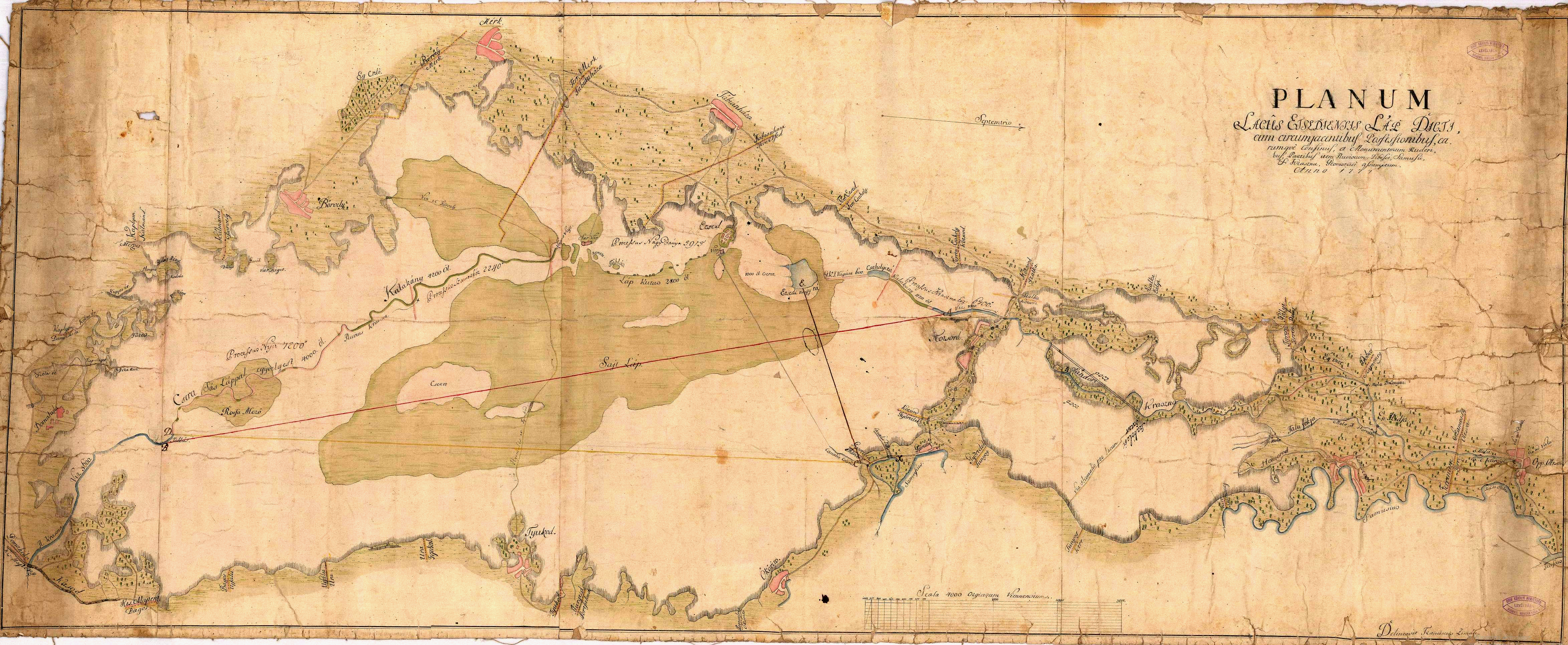 Az Ecsedi-láp legrégebbi ismert térképe 1777-ből. Az Ecsedi-láp és környéke vízrajzi térképe, fokhálózat nélkül, erdőjelöléssel, települések vázlatos alaprajzban névvel, utak, mocsárvárak Ecsedi-láp a körülöttek fekvő településekkel (Ecsed, Mérk, Börvely, Csaholy, Győrtelek, Ököritó, Tyukod stb. Szatmár m.) határaikkal, romokkal, Tisza, Szamos, Kraszna folyókkal Planum lacus Etsediensis Láp dicti, cum circumjacentibus possessionibus, earumque confiniis, et monumentorum ruderibus, partibus item fluviorum Tibisci, Samusii et Kraszna, geometrice assumptum